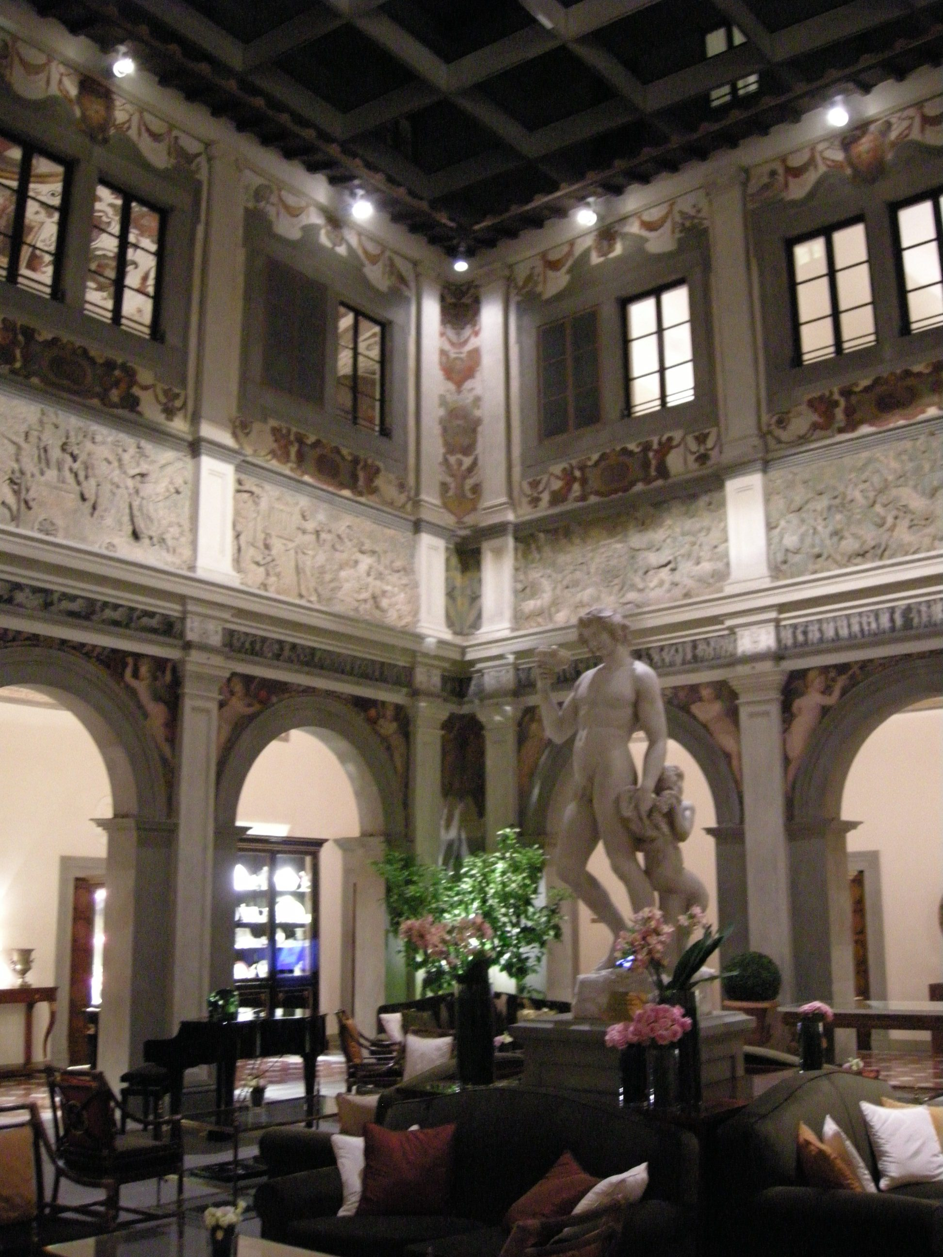 Cortile di giuliano da sangallo